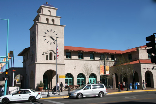 알버커키 ALvarado기차 정거장